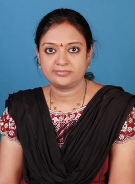 స్రవంతి ఐతరాజు